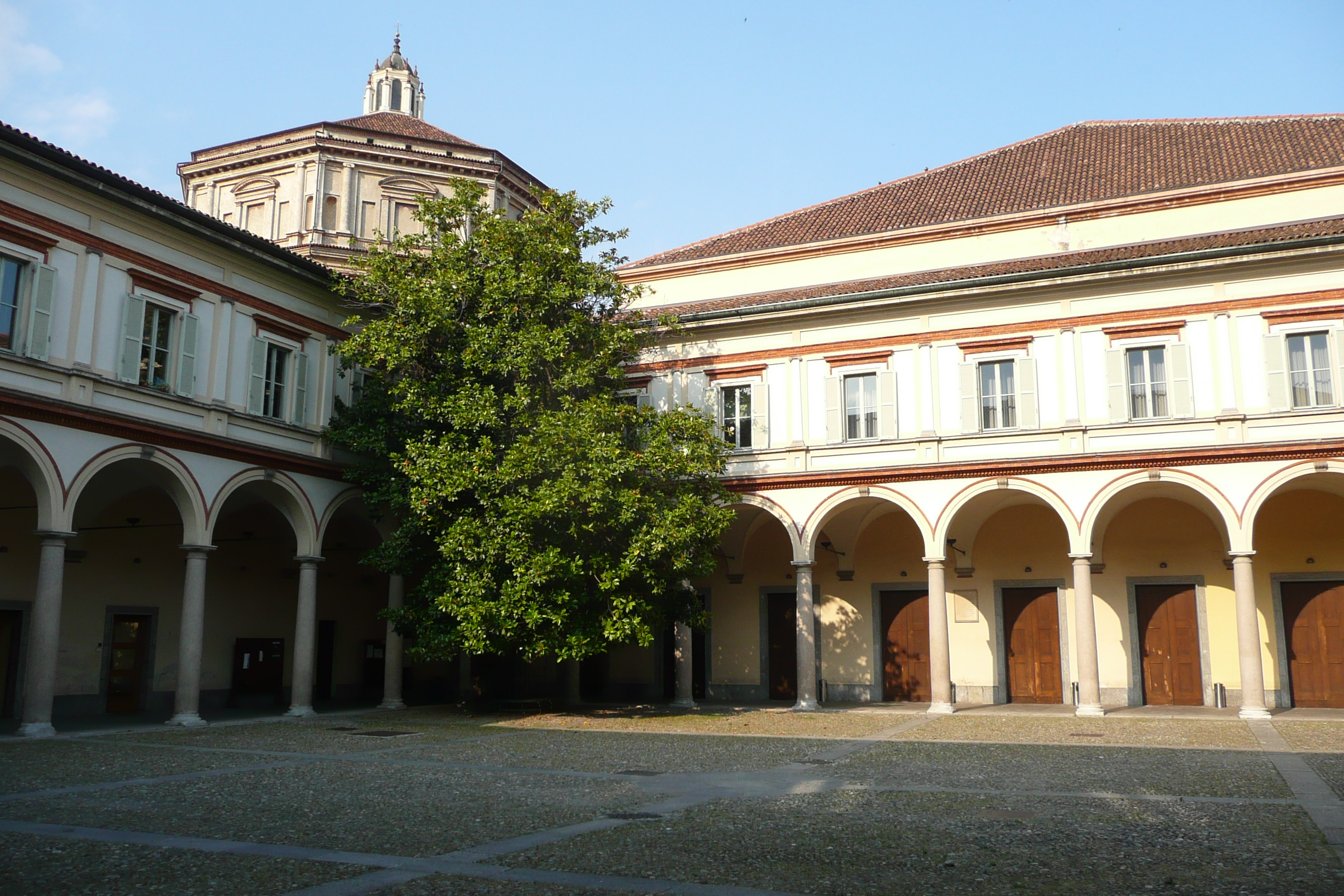 Conservatorio Giuseppe Verdi (Milan), cortile, ex chiostro di Santa Maria della Passione (XIV secolo)